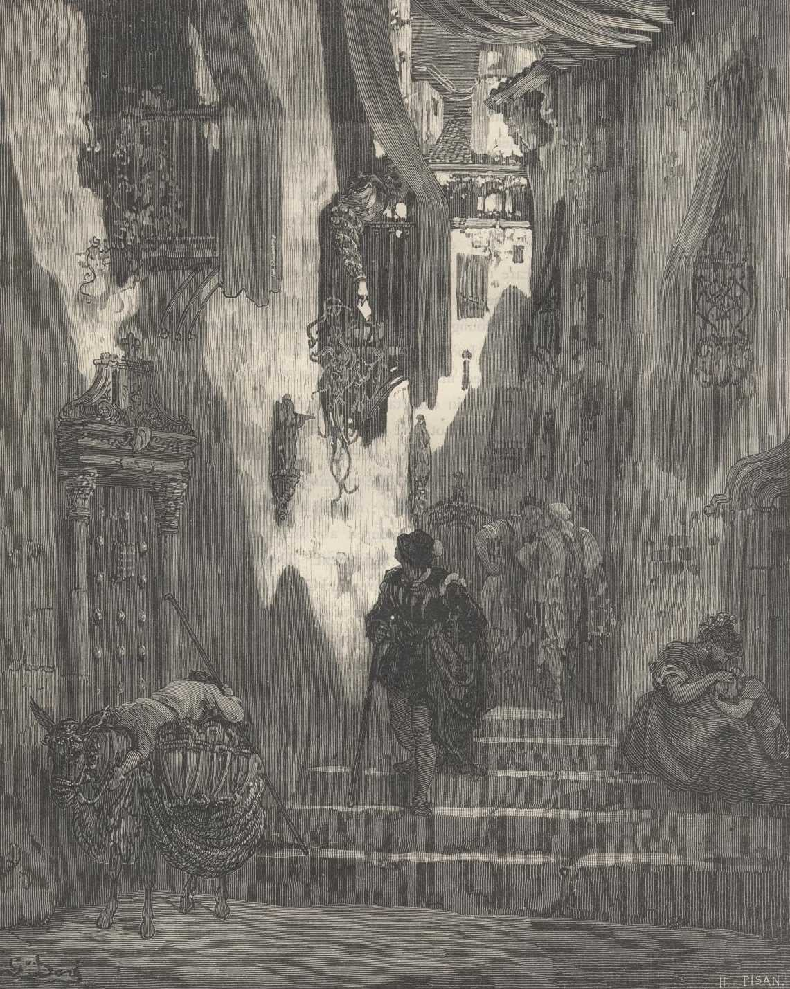 Ilustração de Gustave Doré para a edição de 1863 de "Dom Quixote" de Miguel de Cervantes